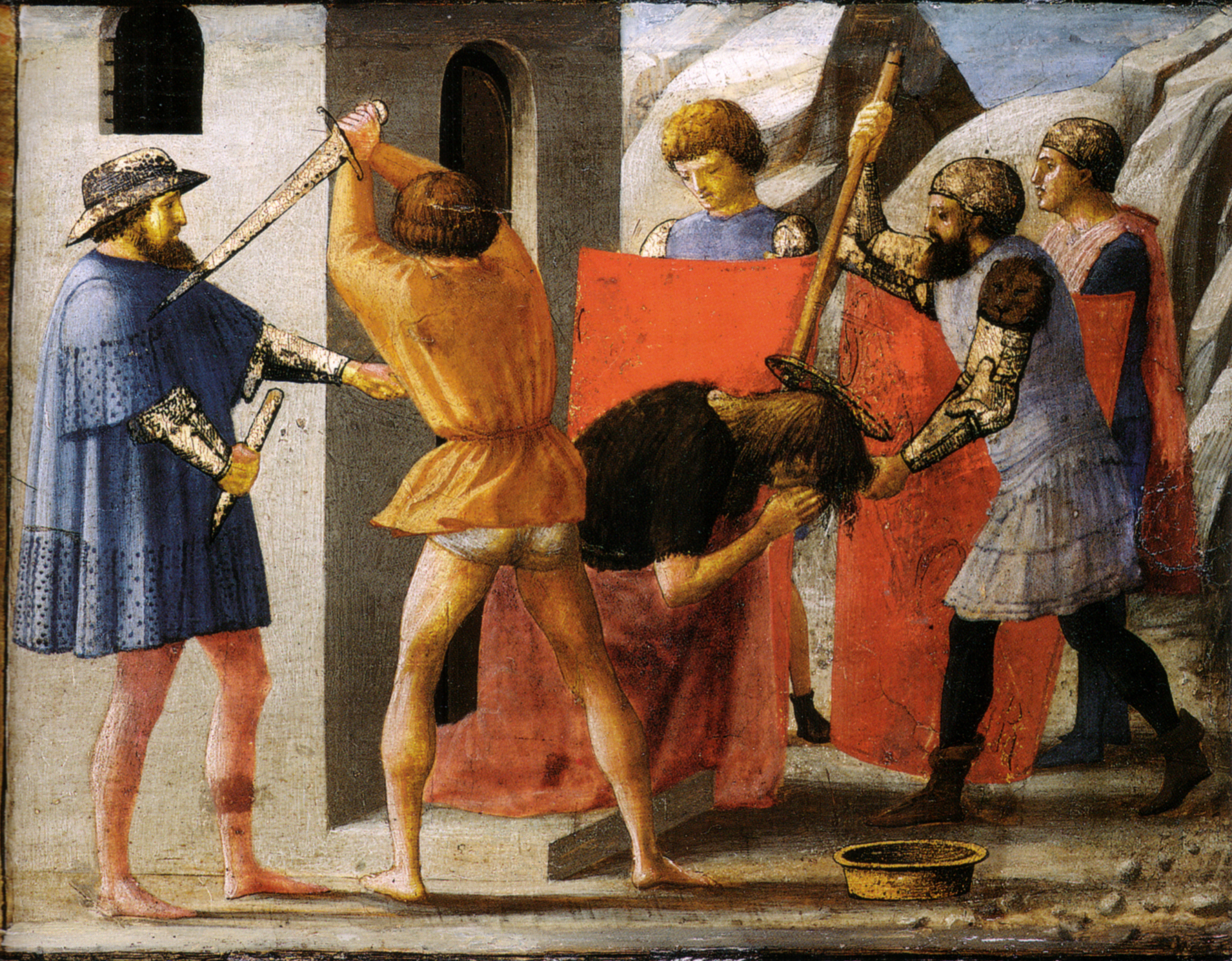 Predella panel from the Pisa Altar